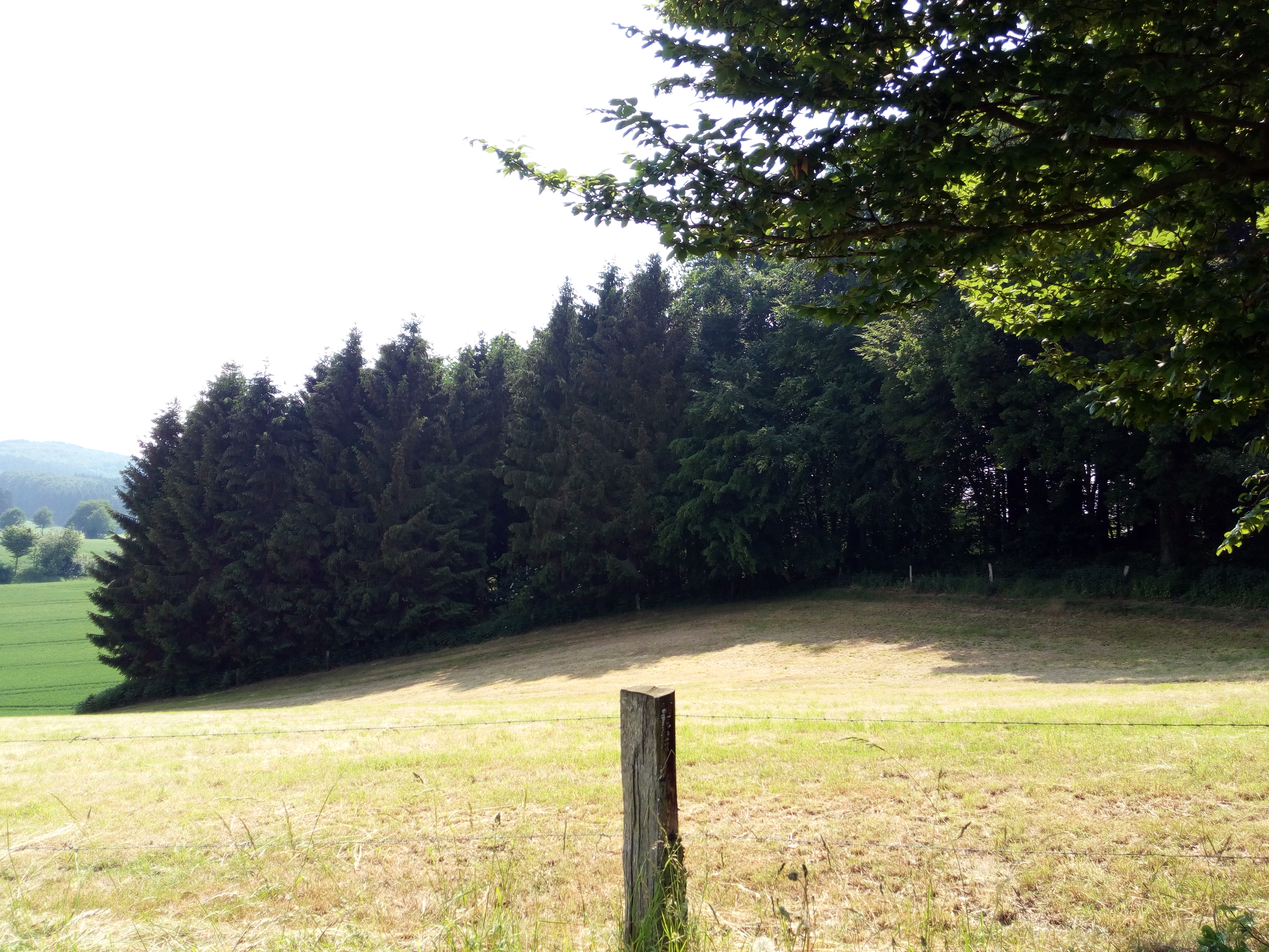 Hier sind die Hasequelle und die Uhlequelle nicht weit. Man denkt, man ist in Bayern, wenn man die tolle Aussicht vom Berg genießt.